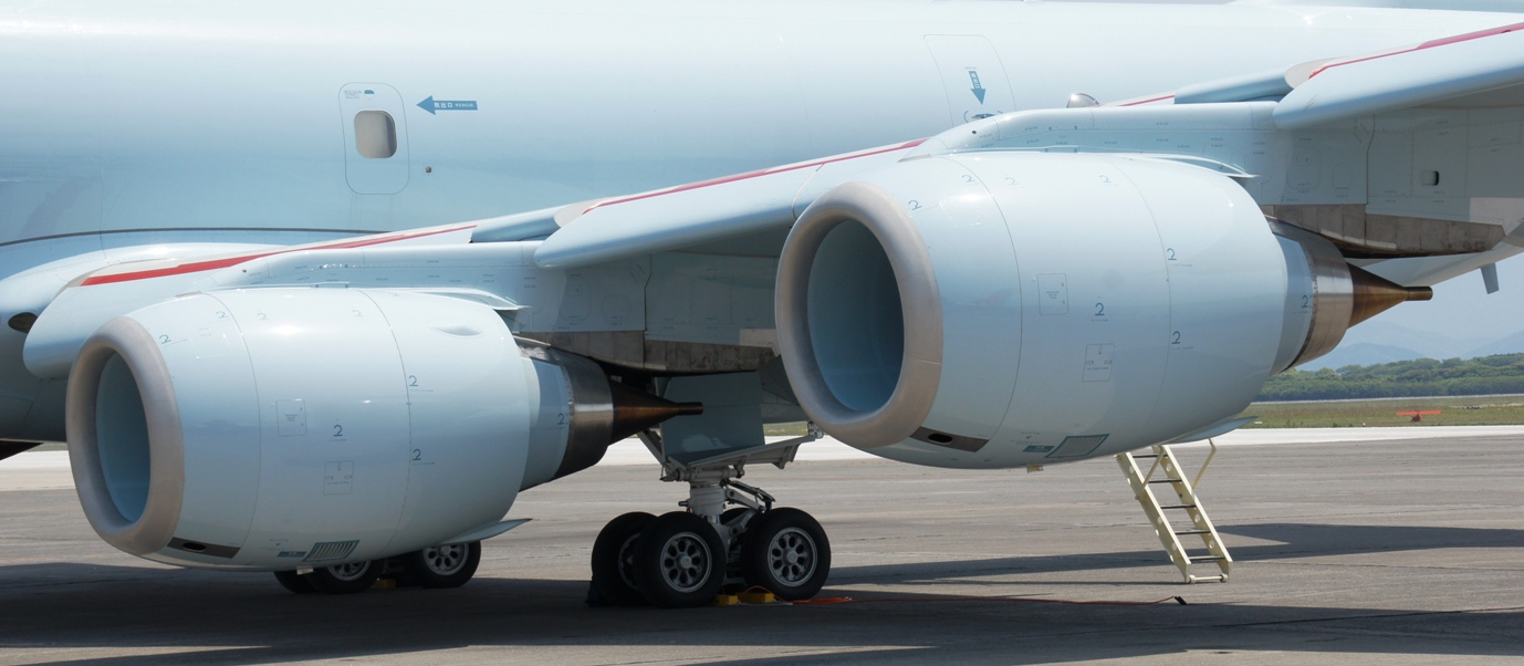 2013年エアーメモリアルin鹿屋にて撮影